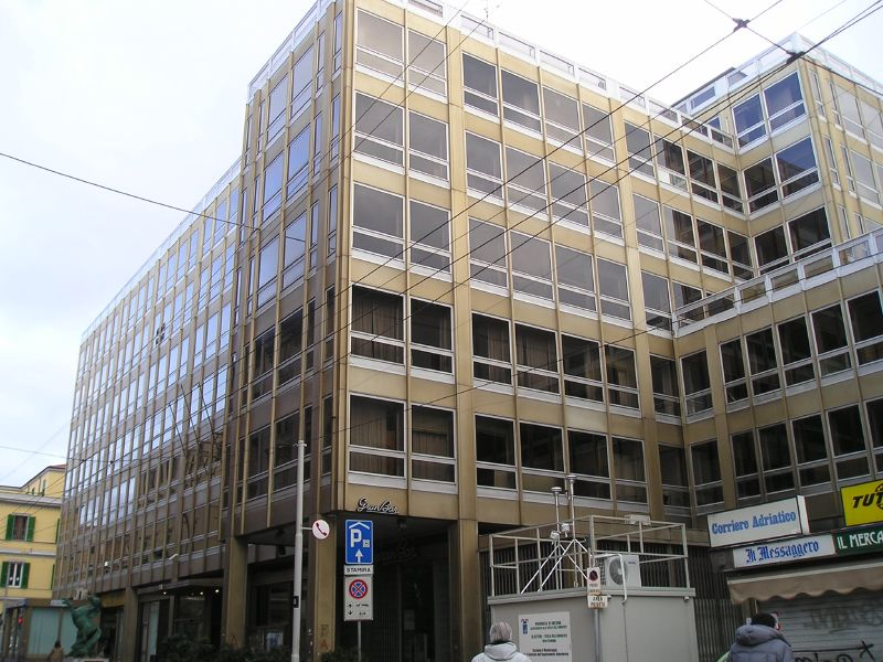 sede storica della provincia di Ancona